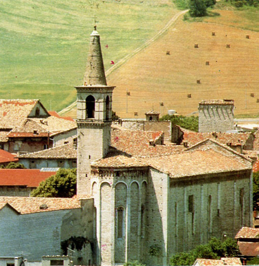 comune di cagli